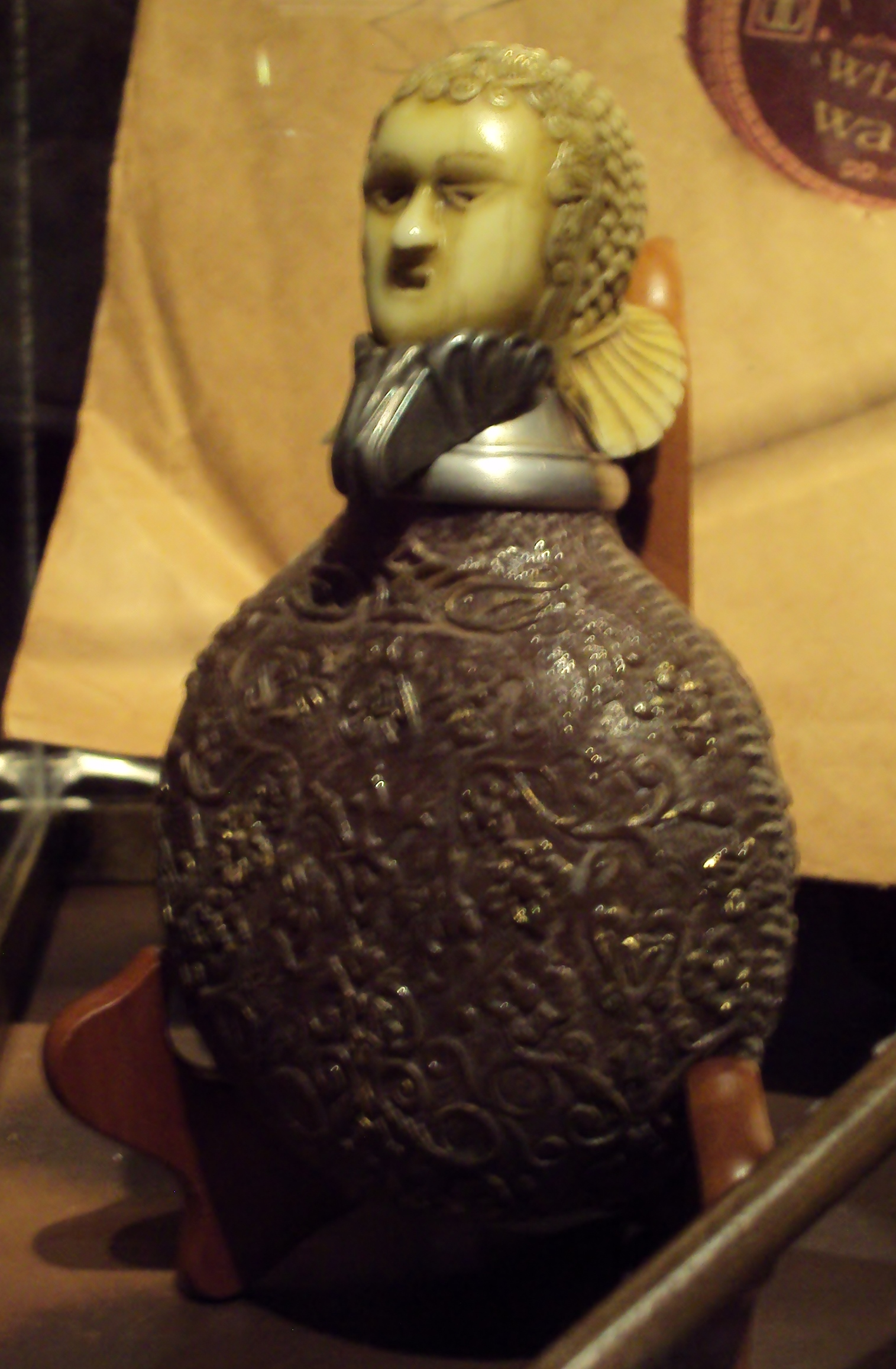 Fles met Wisseldrank (Engels: Polyjuice Potion) van Alastor "Dwaaloog" Dolleman (Engels: Alastor "Mad-Eye" Moody) tijdens Harry Potter: The Exhibition in Brussel (België)